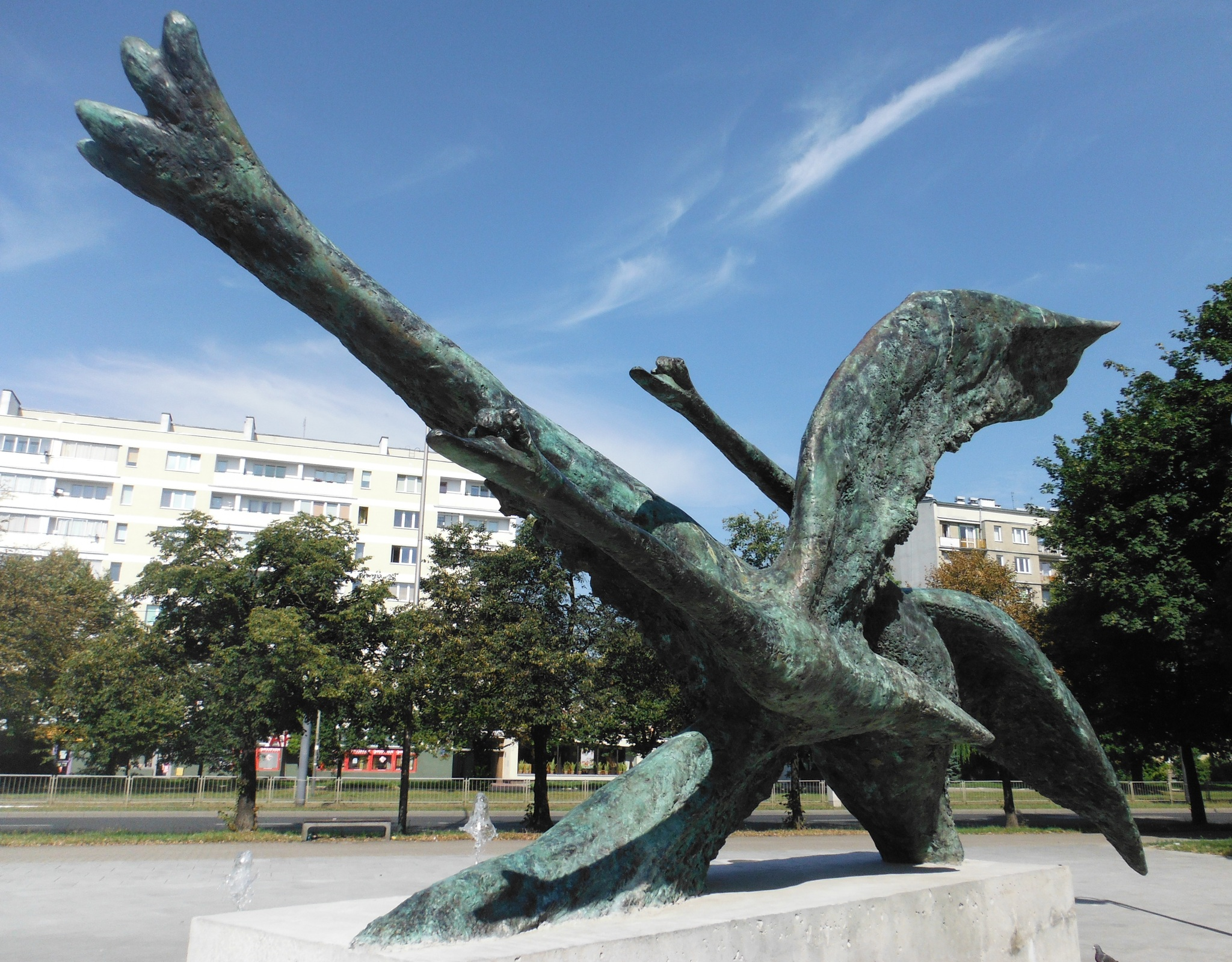 Rzeźba Anny Dębskiej pt. "Lecące Łabędzie" na placyku przy ul. Grójeckiej na warszawskiej Ochocie.